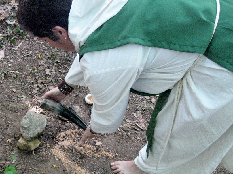 Marta Vey, Ard Bandrui from the Dun Ailline Brotherhood